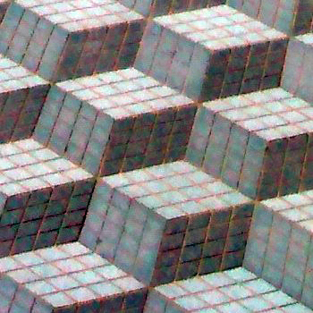 Detalle del pavimento del Paseo del Postiguet, Alicante.